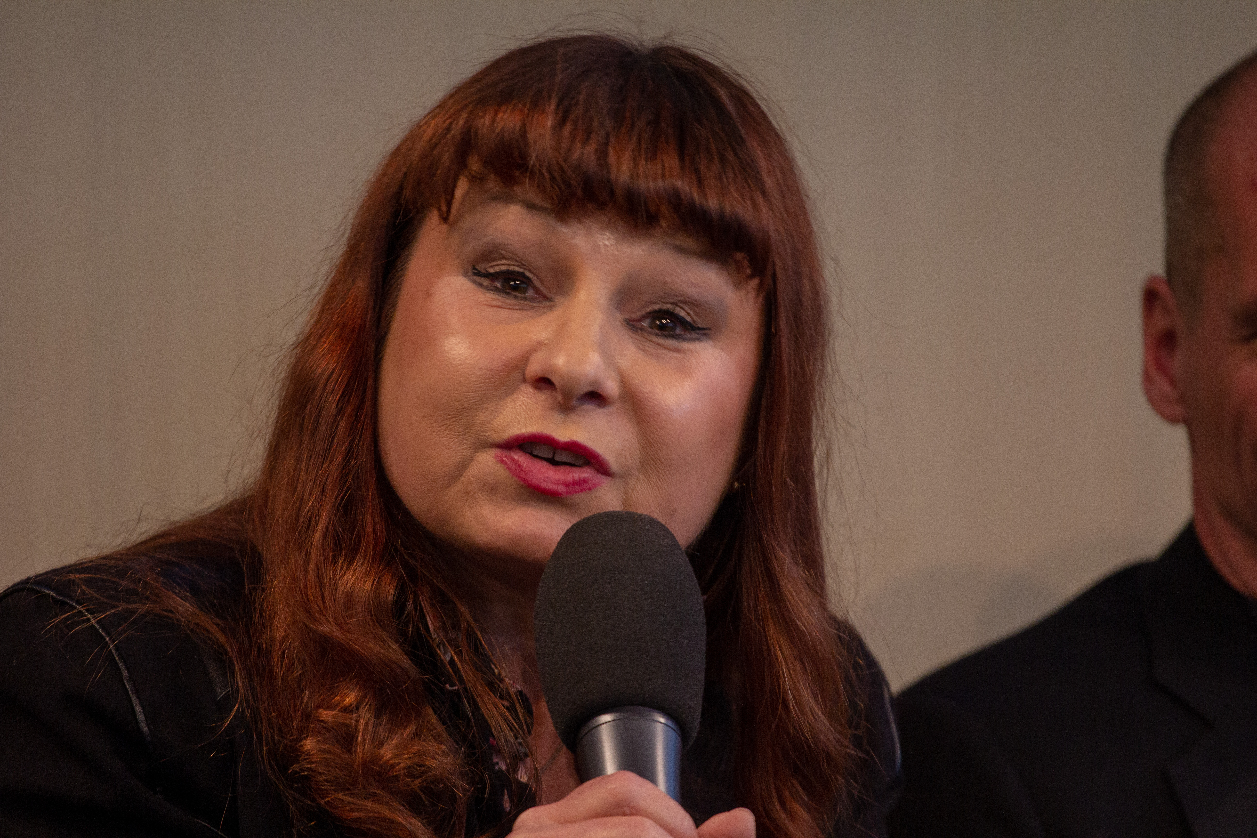 Veranstaltung "A Soul for Europe" am 13. April 2019 in der Akademie der Künste in Berlin. Representatives of European Parties: Carl Grouwet (ALDE), Damian Boeselager (Volt), Hannah Neumann (Bündnis 90/Die Grünen), Violeta Tomic (European Left), Yanis Varoufakis (DIEM25), Elmar Brok (MEP European People’s Party). With: Tanja Dückers, Noémi Kiss, Katja Sinko, Kathrin Röggla and Mia Florentine Weiss. Intervention by Volker Schlöndorff and Hannes Swoboda (former MEP). Moderation: Volker Hassemer